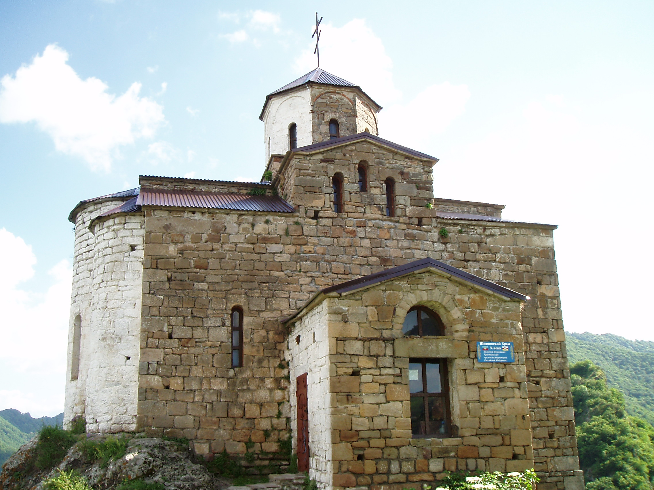 Фотография была сделана во время поездки по Карачаево-Черкессии